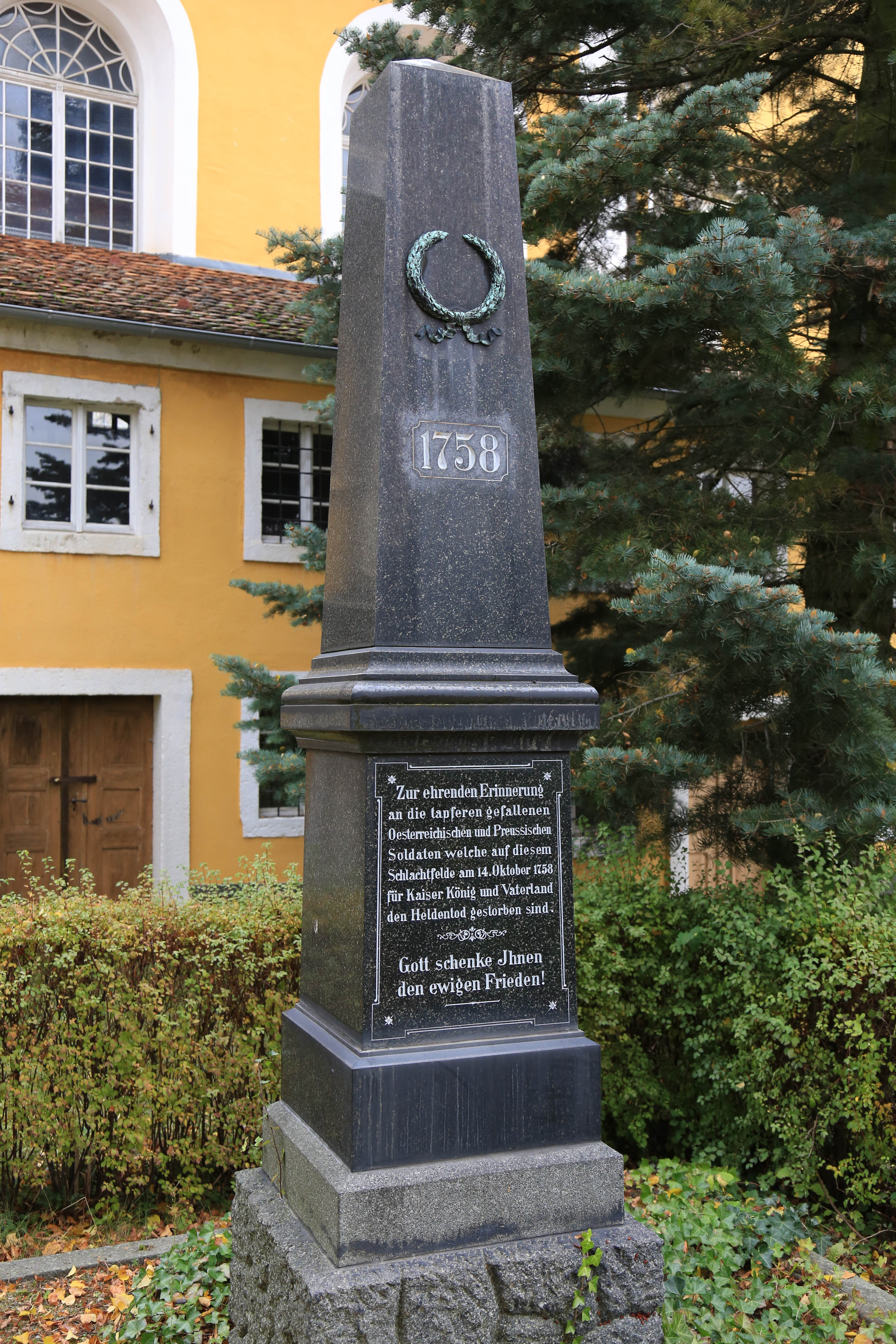 Hochkirch Kirche (10)